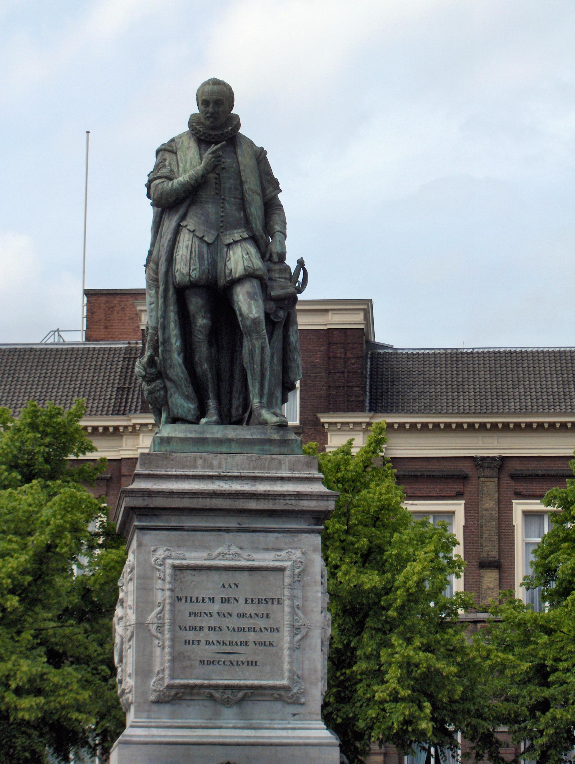 Standbeeld van Willem van Oranje in Den Haag, Nederland